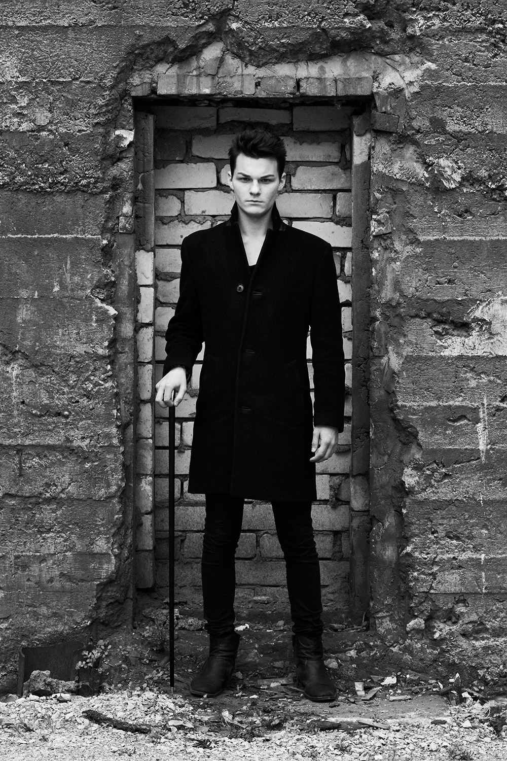 Kevin Chris